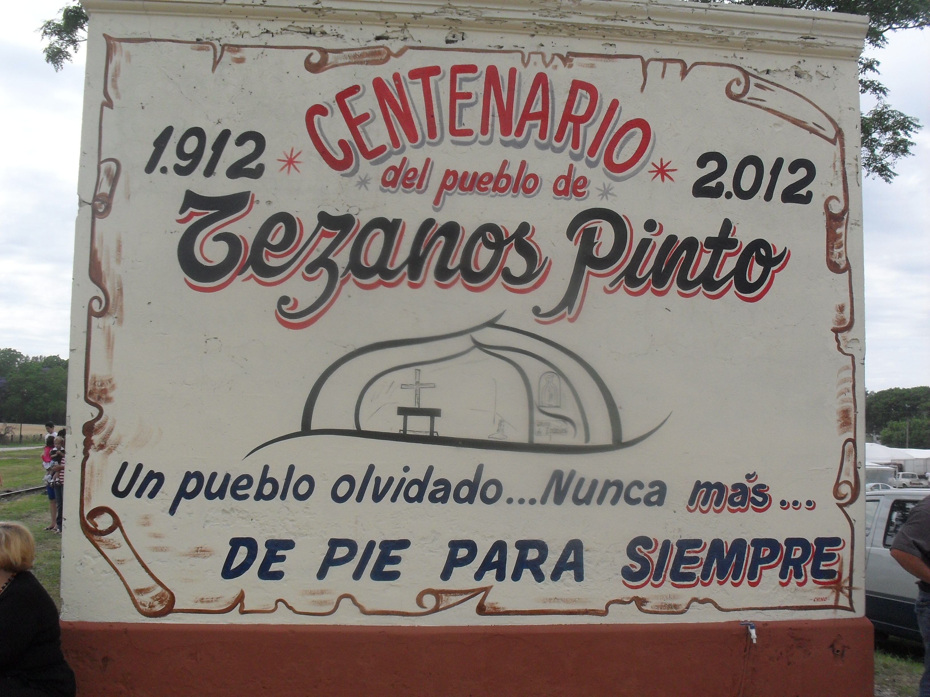 Bello.